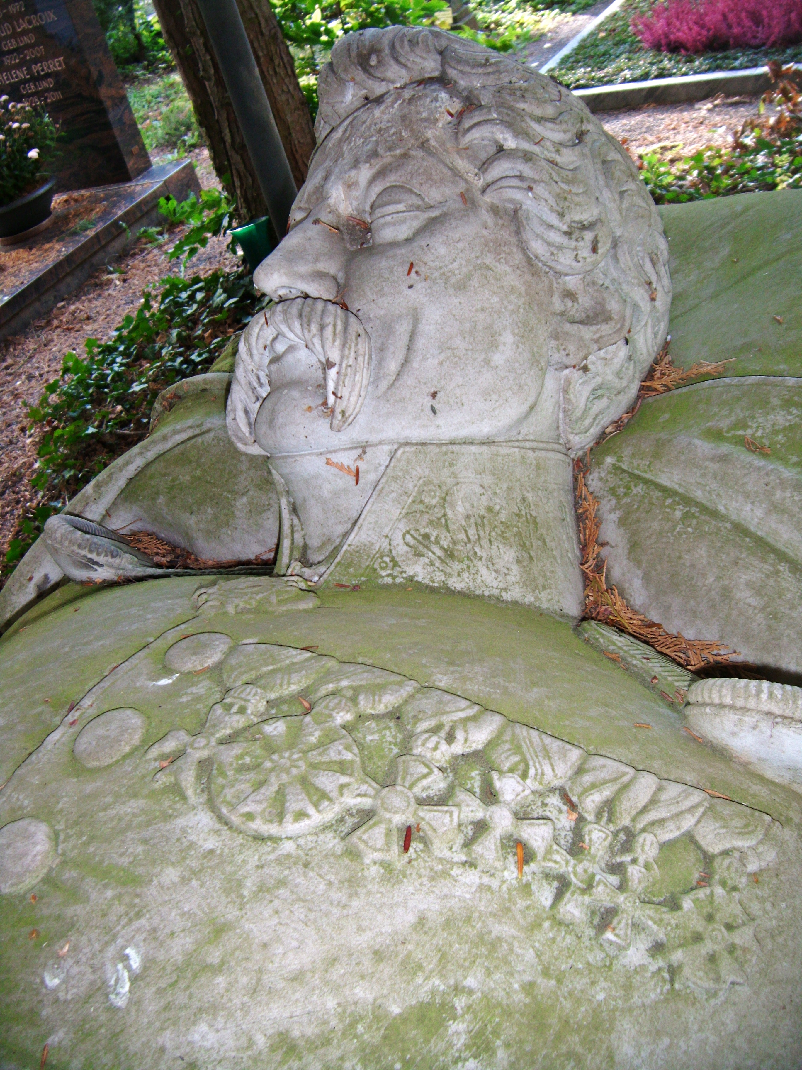 Karl Freiherr von Pflummern (1787-1850), Bayerischer Generalmajor und Festungskommandant von Landau (Pfalz), Portrait von seinem Grabmal, Friedhof Landau